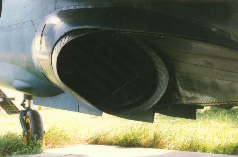 Linke Schubdüse der Jak-36 , ist um 100° Schwenkbar (0° geradeausflug, 90° Senkrechte Starts 100° Senkrechte Landungen &Abbremsung des Vorwärtsflug).